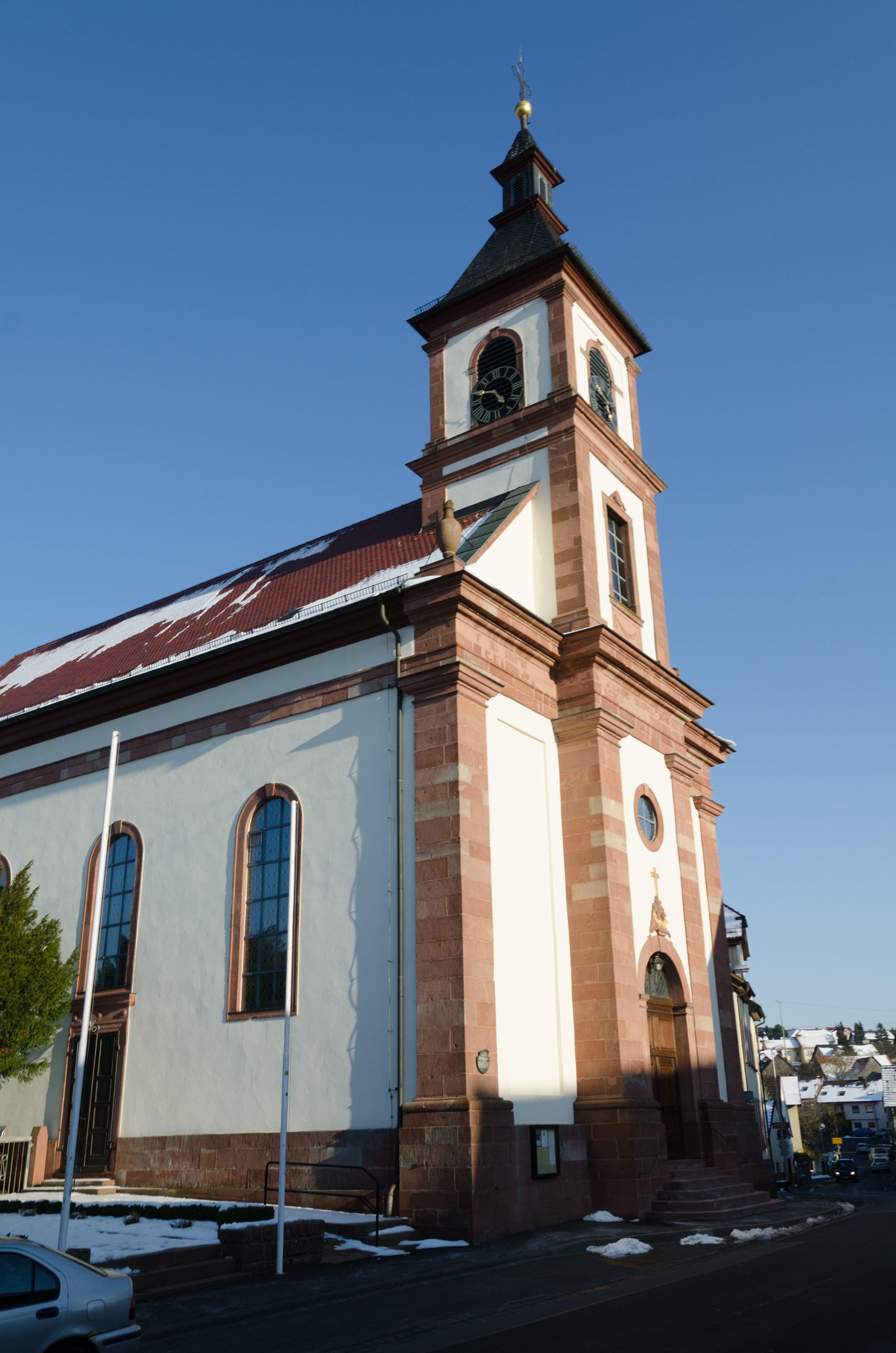 Esselbach, Hauptstraße 10, Pfarrkirche